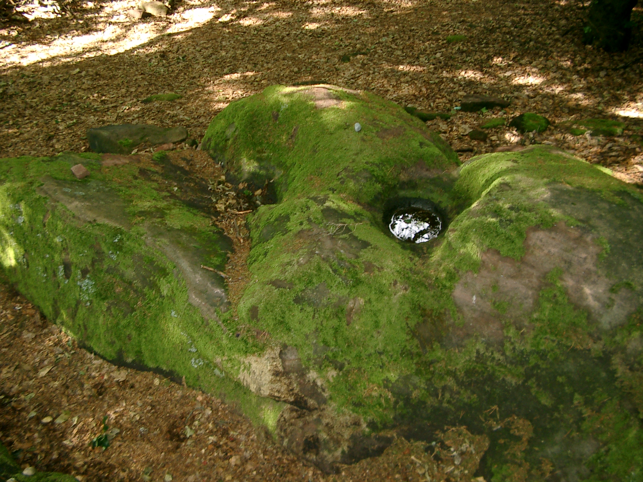 früher als "Gletschertopf" bezeichnete runde Vertiefung im Buntsandstein (Kugelsandstein?)